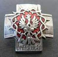 Krzyż Zrzeszenia "Wolność i Niezawisłość" (WiN) 1945-1954